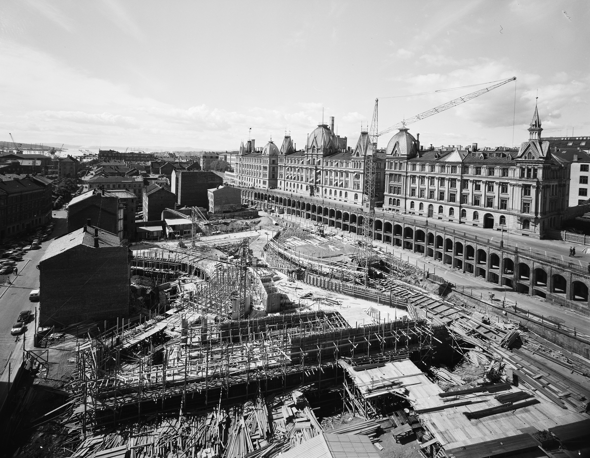 Bygging av Storebrands nye hovedkontor i Haakon VIIs gate 10. Huset som står igjen i venstre bue, er Munkedamsveien 7. Foto: Leif Ørnelund, 1961. Fra Byhistorisk samling hos Oslo Museum.